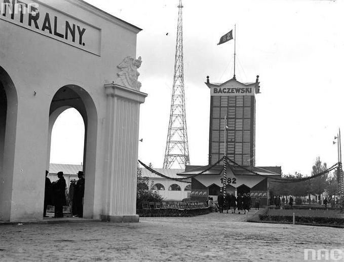 Fragment pawilonu centralnego. W tle wieża pawilonu fabryki wódki, likieru i rumu J.A. Baczewski we Lwowie. (X Międzynarodowe Targi Wschodnie we Lwowie).